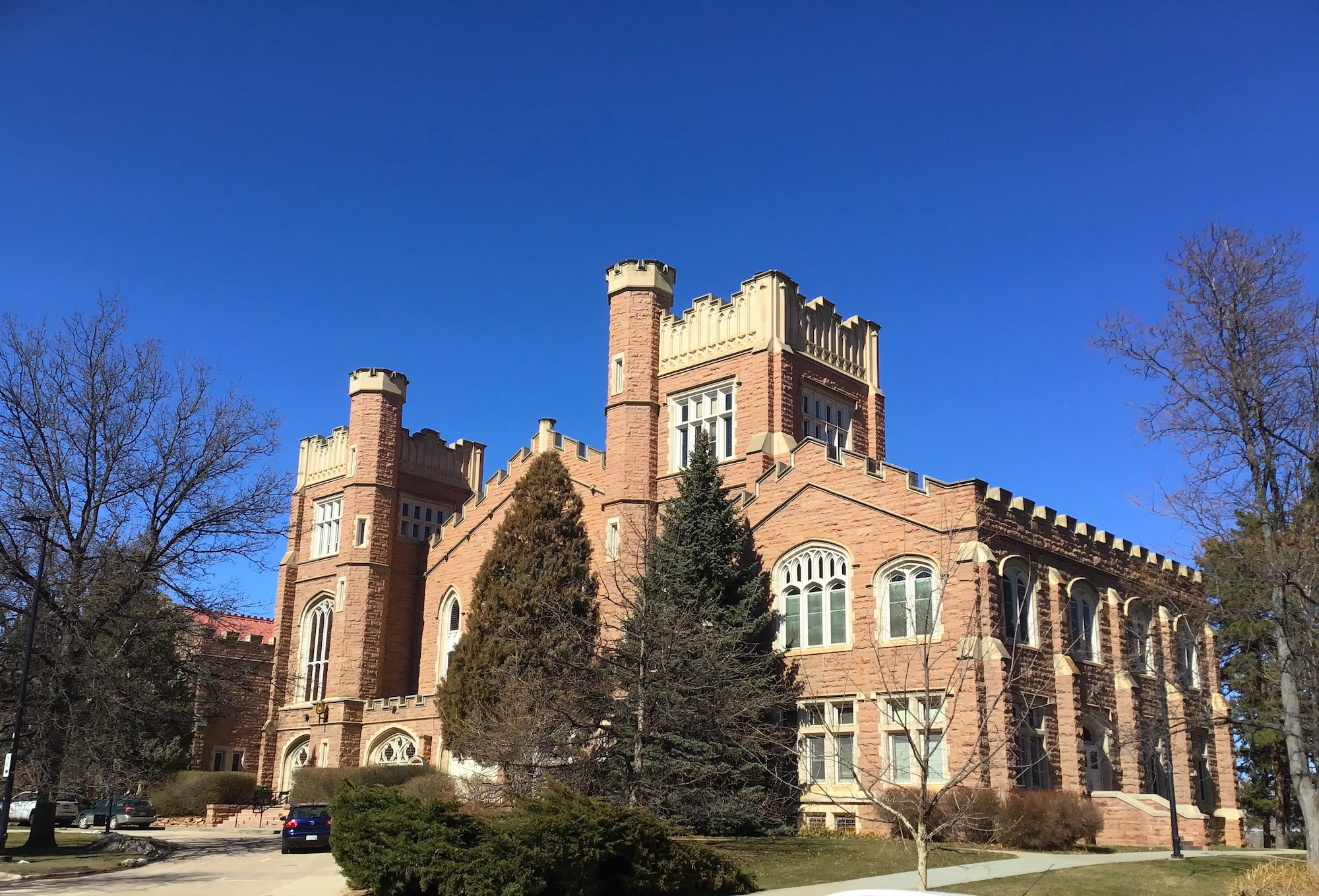 This building is still used as a concert hall.